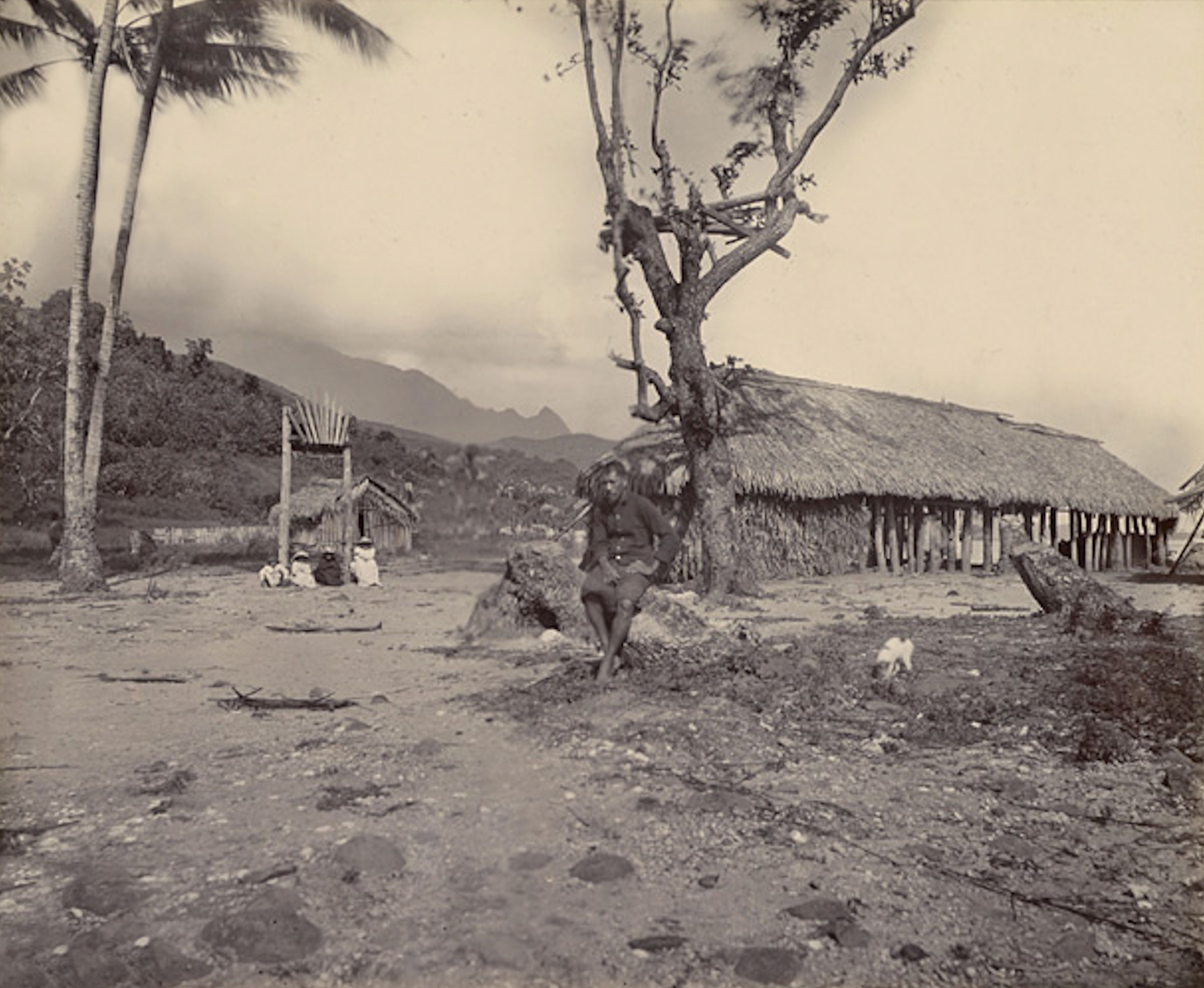 Le fort de Teraupo, 1897. Le "Pa" ou camp retranché de Teraupo à Raiatea